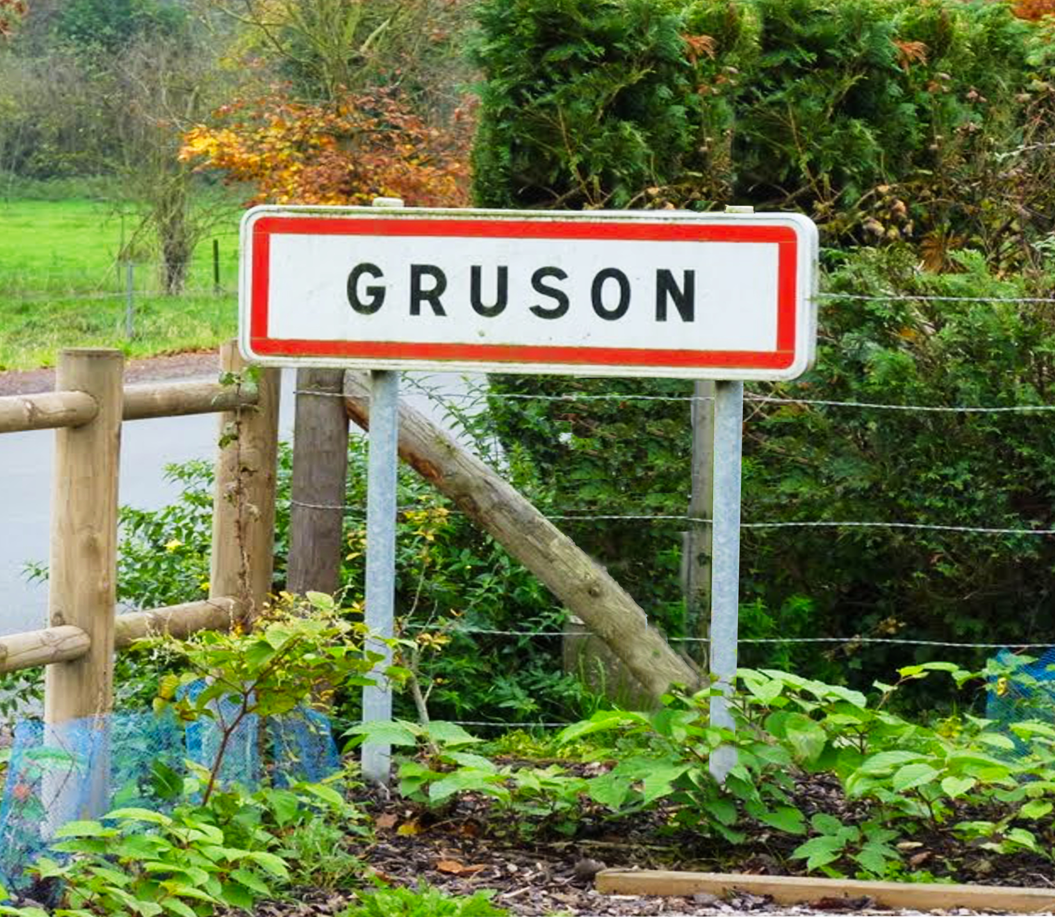 Vue d'une entrée de la commune de Gruson, Nord.- France.